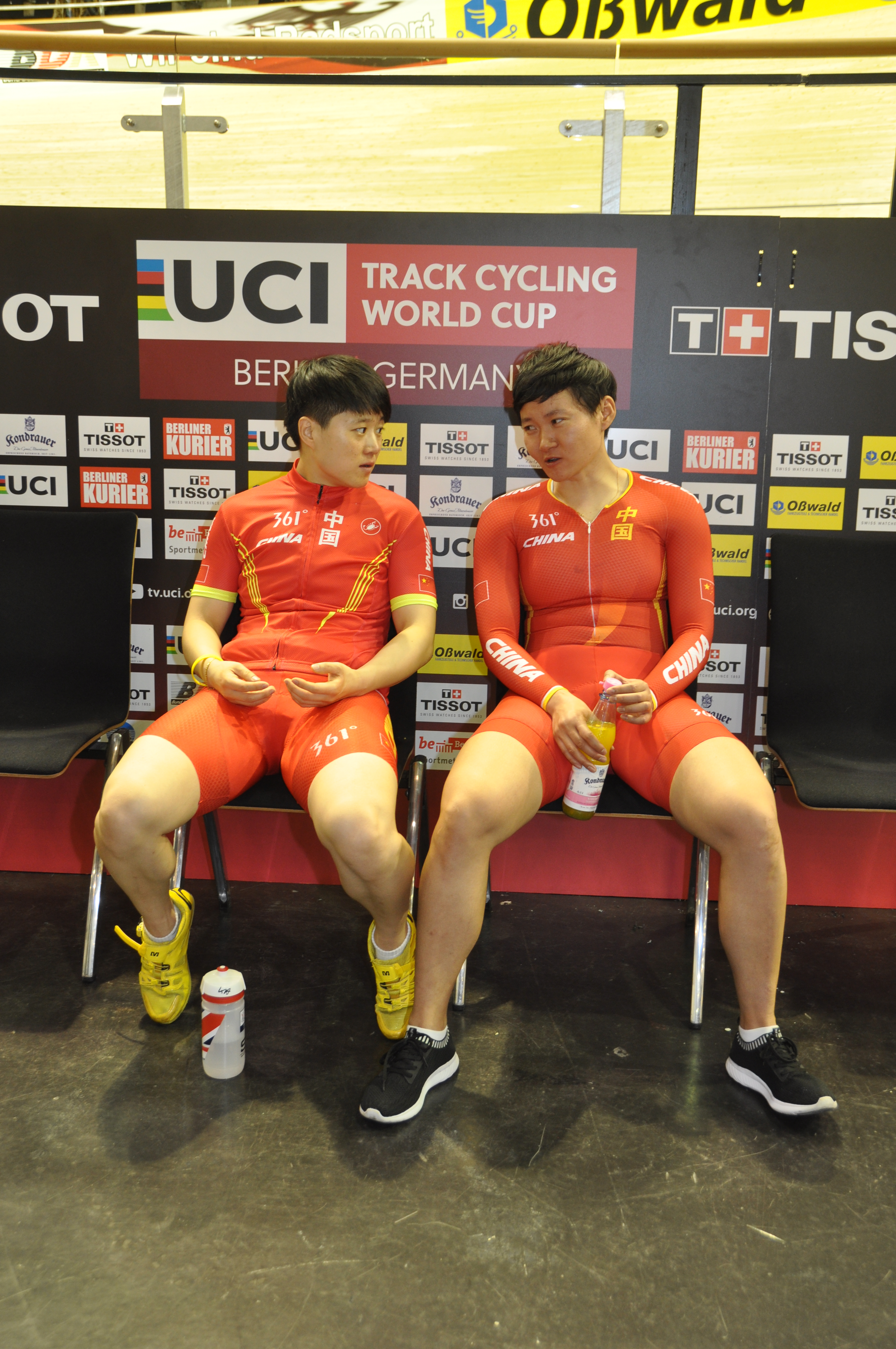 Lin Junhong (l.), Zhong Tianshi, chinesische Radsportlerinnen, vor dem Start zum Teamsprint